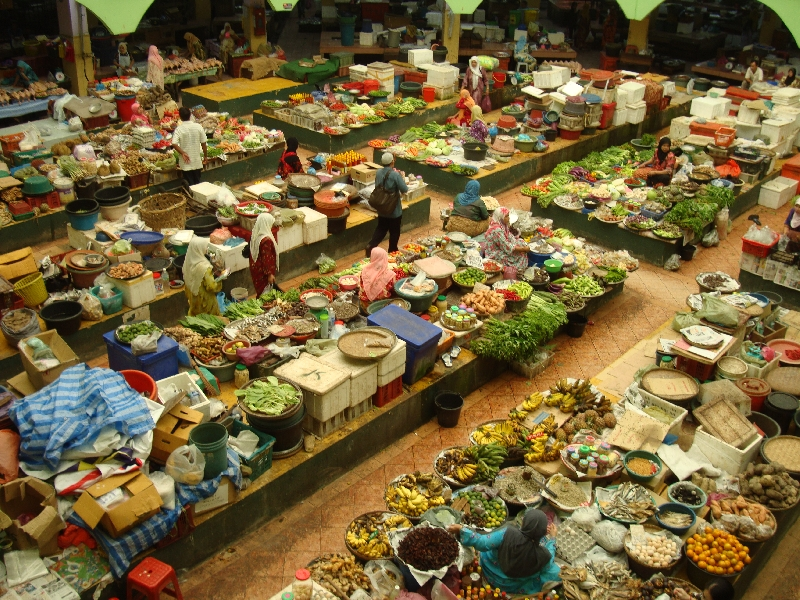 Markt in Kota Bahru